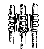 Tripod lashing 2